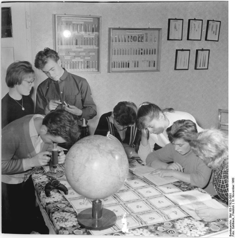 Hirschfeld, Lehrlinge im Selbststudium Zentralbild Gahlbeck 10.11.1960 240 landwirtschaftliche Facharbeiter aus dem Volksgut Hirschfeld 240 Jungen und Mädchen sind seit 1954 am Volkseigenen Gut Hirschfeld im Kreis Freiberg zu qualifizierten landwirtschaftlichen Facharbeitern ausgebildet worden. Die zukünftigen Landwirte sind im "Herrenhaus" des ehemaligen Rittergutsbesitzers untergebracht. Die Jungen und Mädchen haben in dem großen Gebäude ausser ihren Wohn- und Schlafräumen auch Zimmer für die Unterhaltung, für ihre Weiterbildung und für gesellige Zusammenkünfte. Die Regierung stellt jedes Jahr für die Ausbildung un den Unterhalt der Lehrlinge die beachtliche Summe von 100.000 DM zur Verfügung. UBz: Der Klub Junger Neuerer des Volksgutes Hischfeld bei Studien im Mitschurin-Zimmer-.